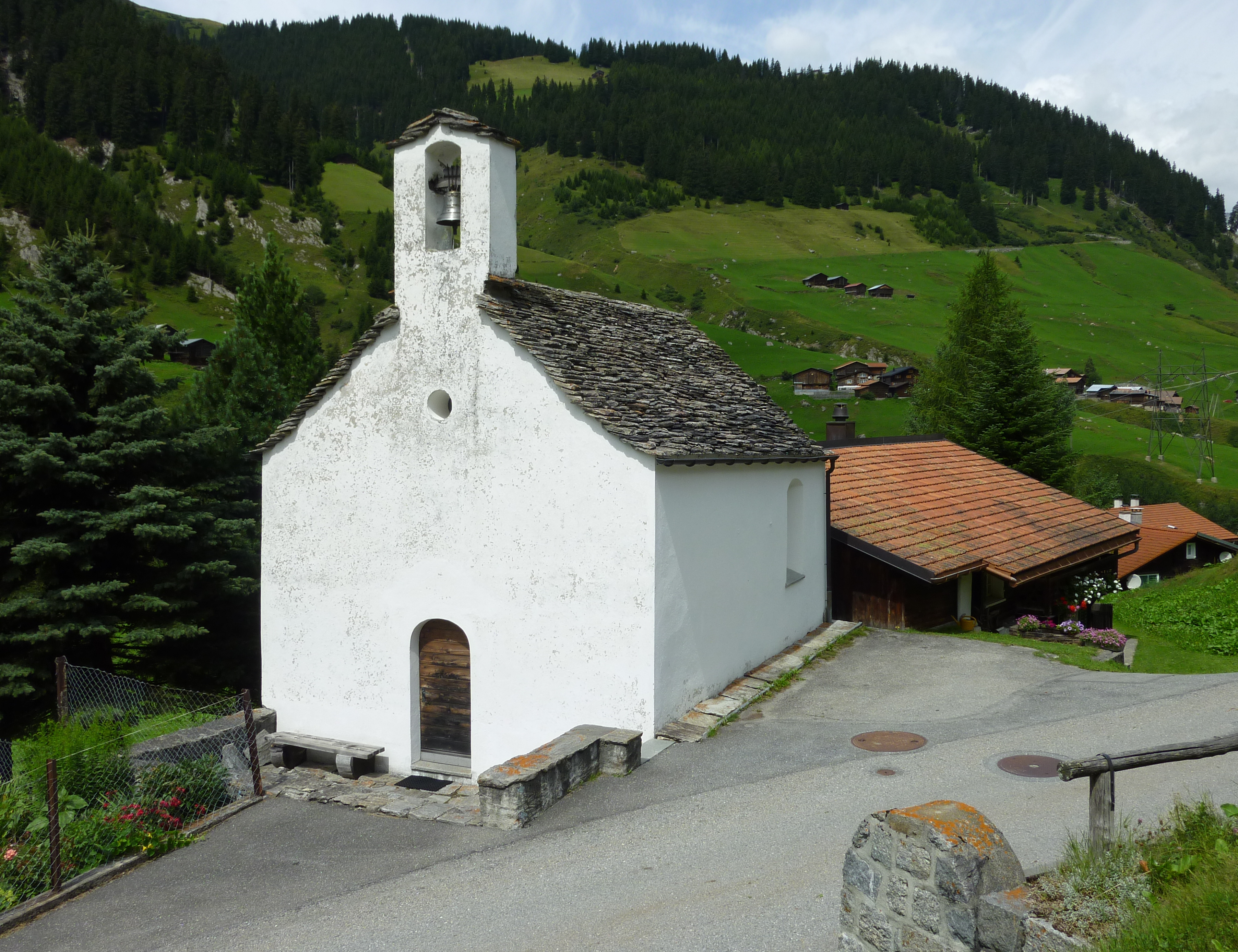 Kapelle St. Rochus Pardé: Ansicht